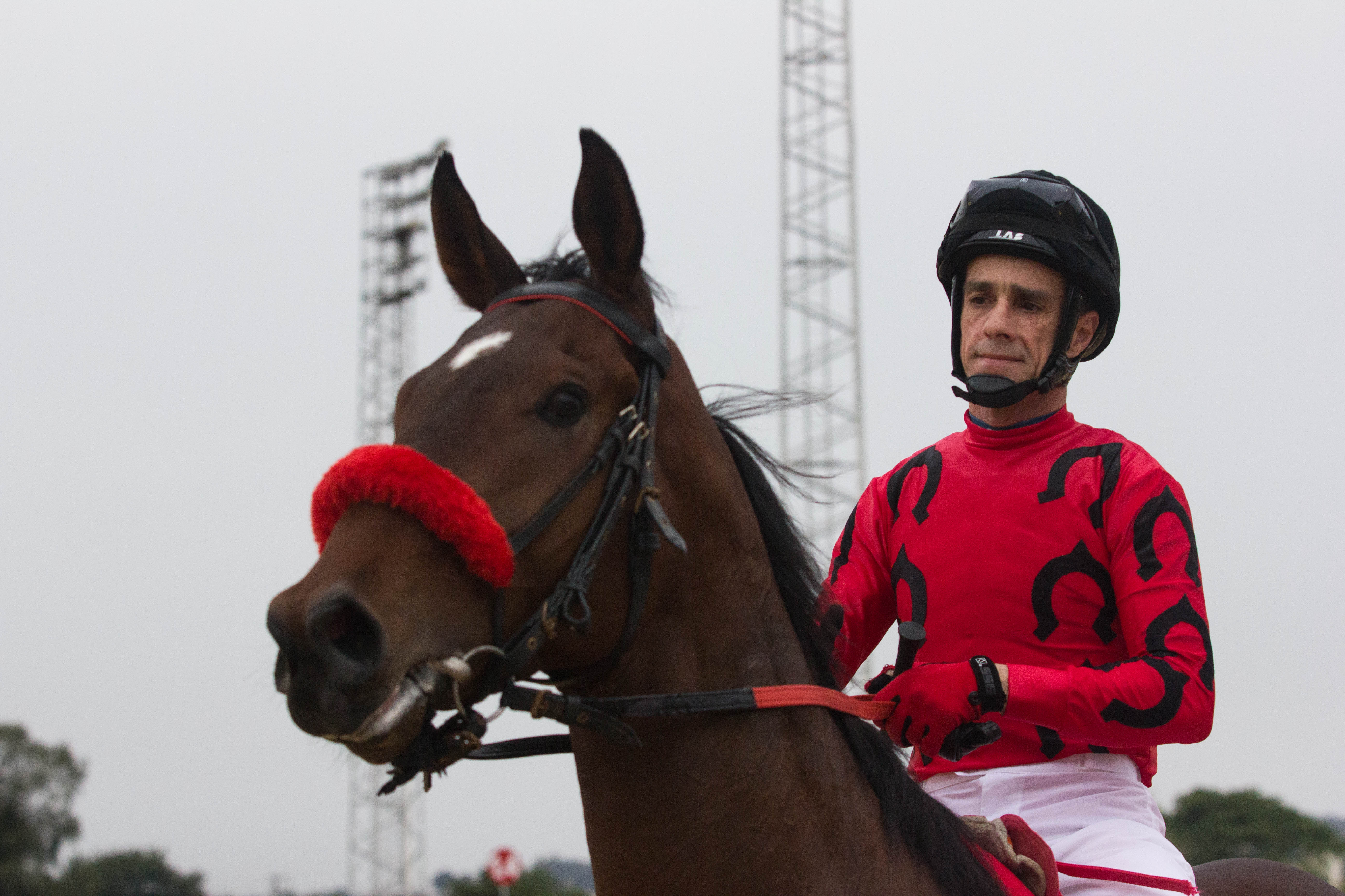 Concentração de Jorge Ricardo para o segundo páreo do desafio. Foto: Frederico Martins (6º semestre)